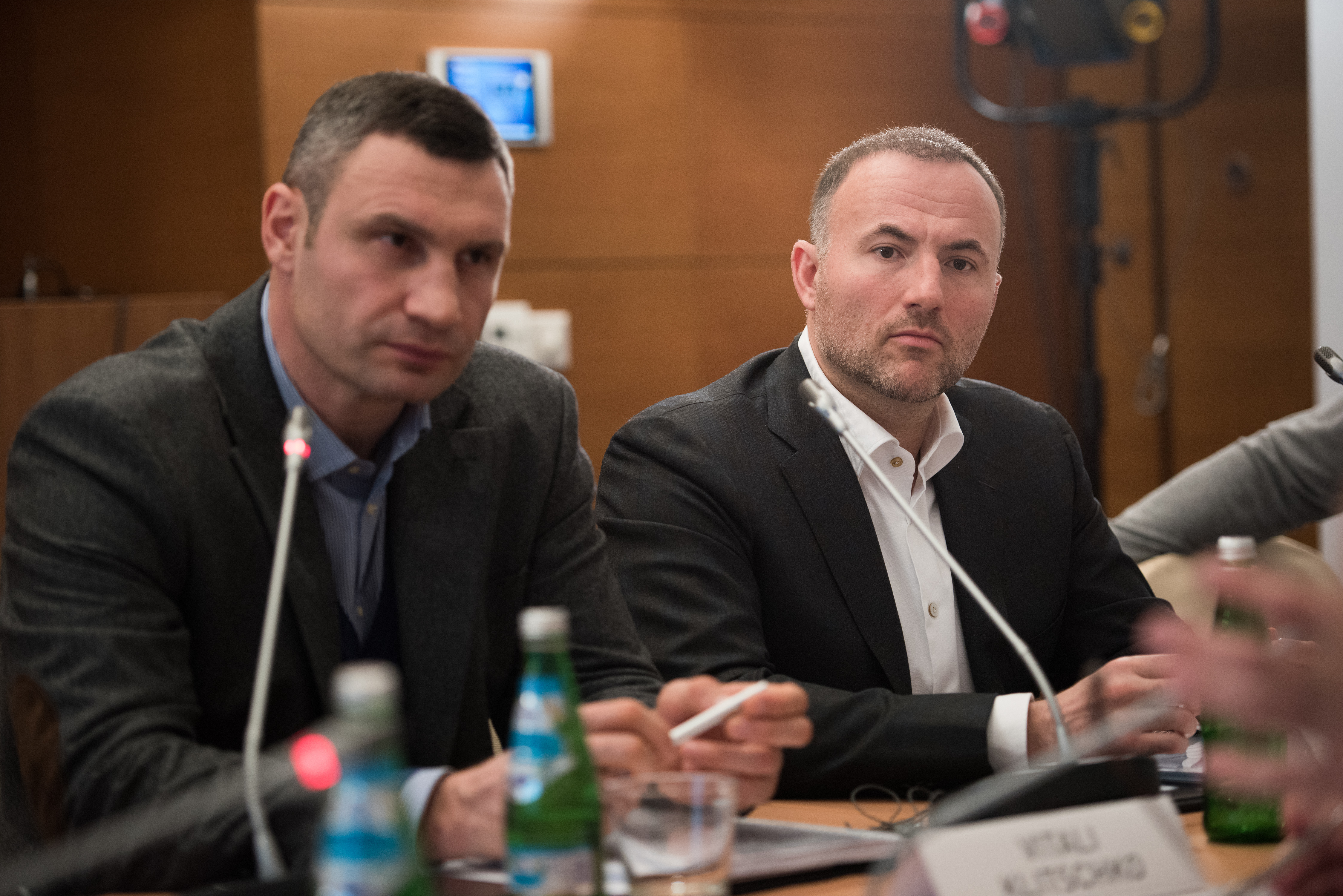 Київський міський голова Віталій Кличко та бізнесмен Павло Фукс